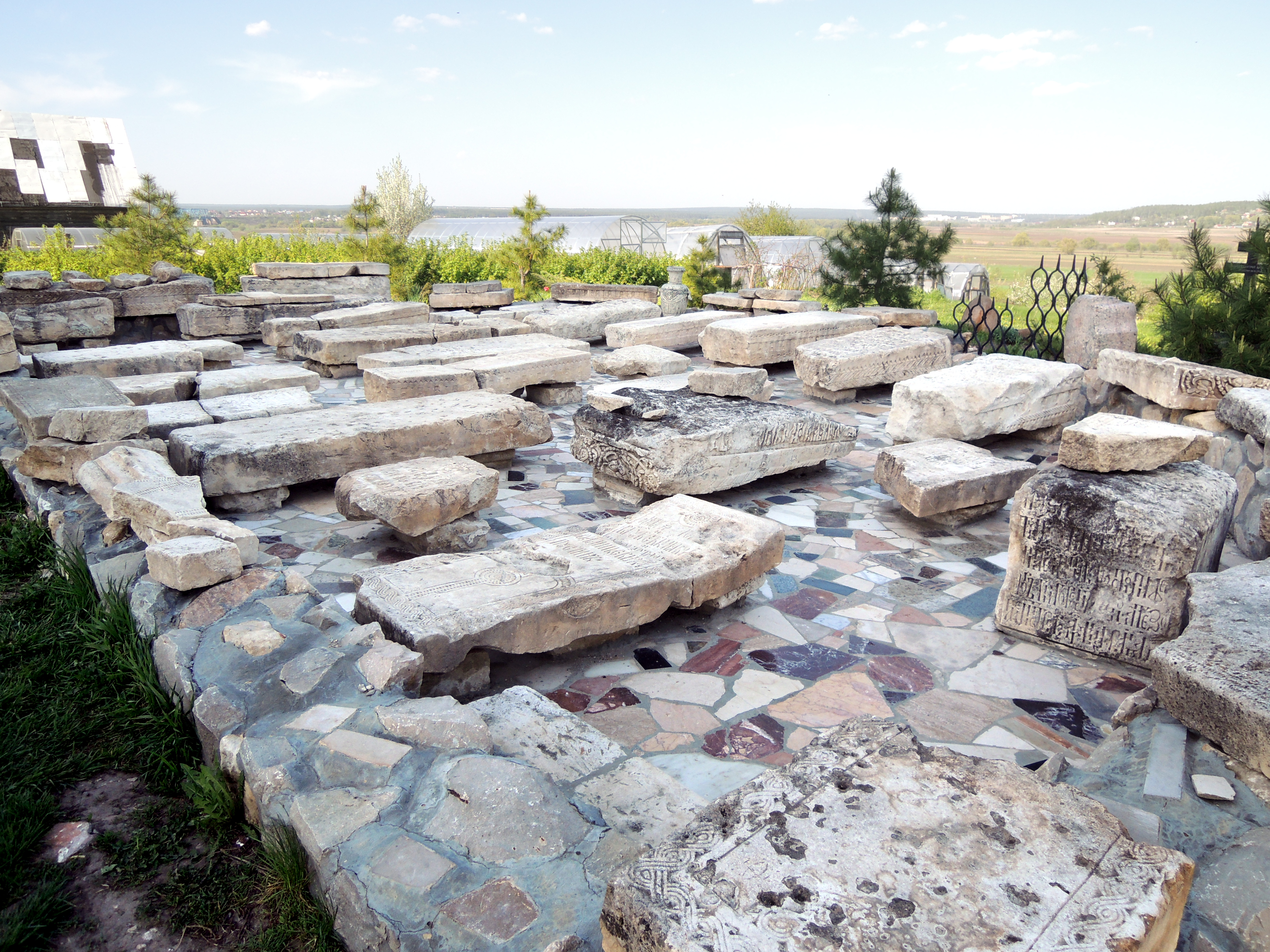 Спасо-Преображенский Воротынский монастырь (Спас на Угре, На-Усть-Угры-Спасо-Воротынский монастырь)